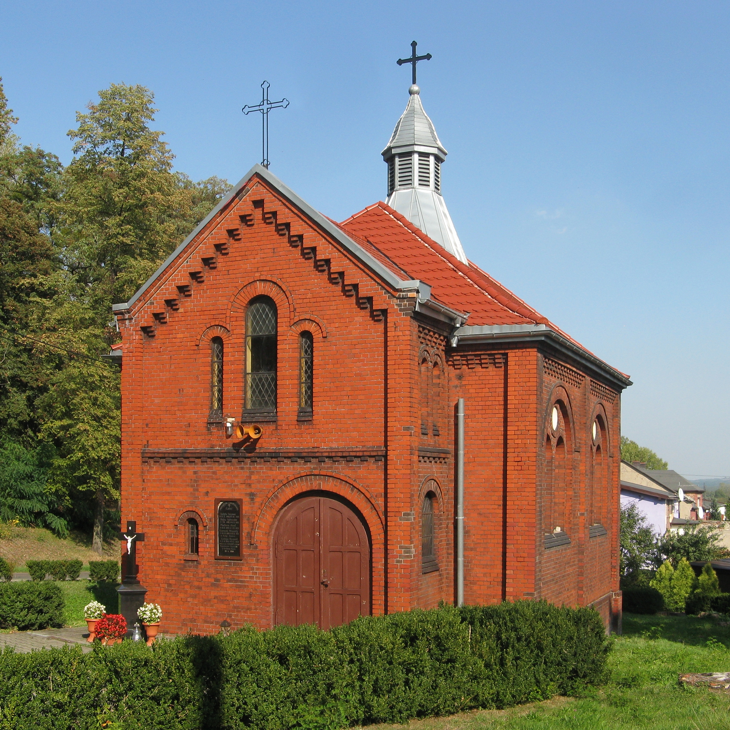 Kaplica p.w. Matki Boskiej Nieustającej Pomocy w Kozłowej Górze (lokalna nazwa: Kapliczka), ukończona w 1907 roku, zabytek nieruchomy.